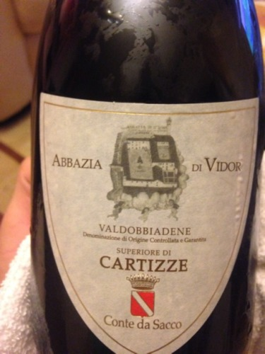 Sektflasche Conte da Sacco